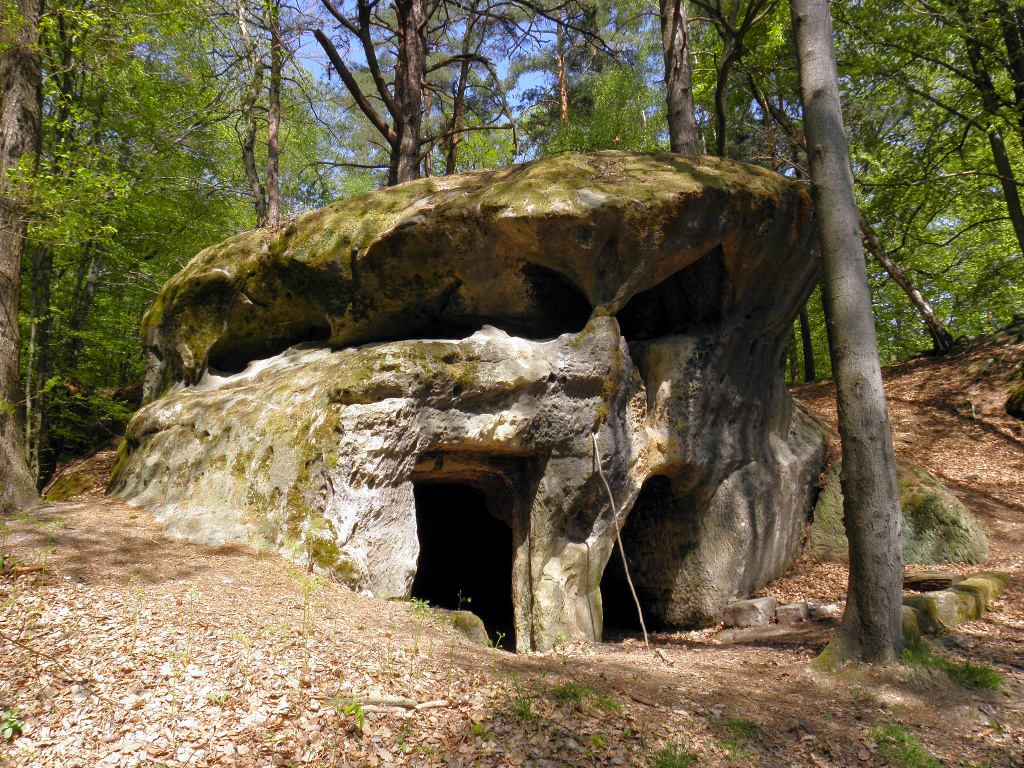 Skalní obydlí Vernerovka